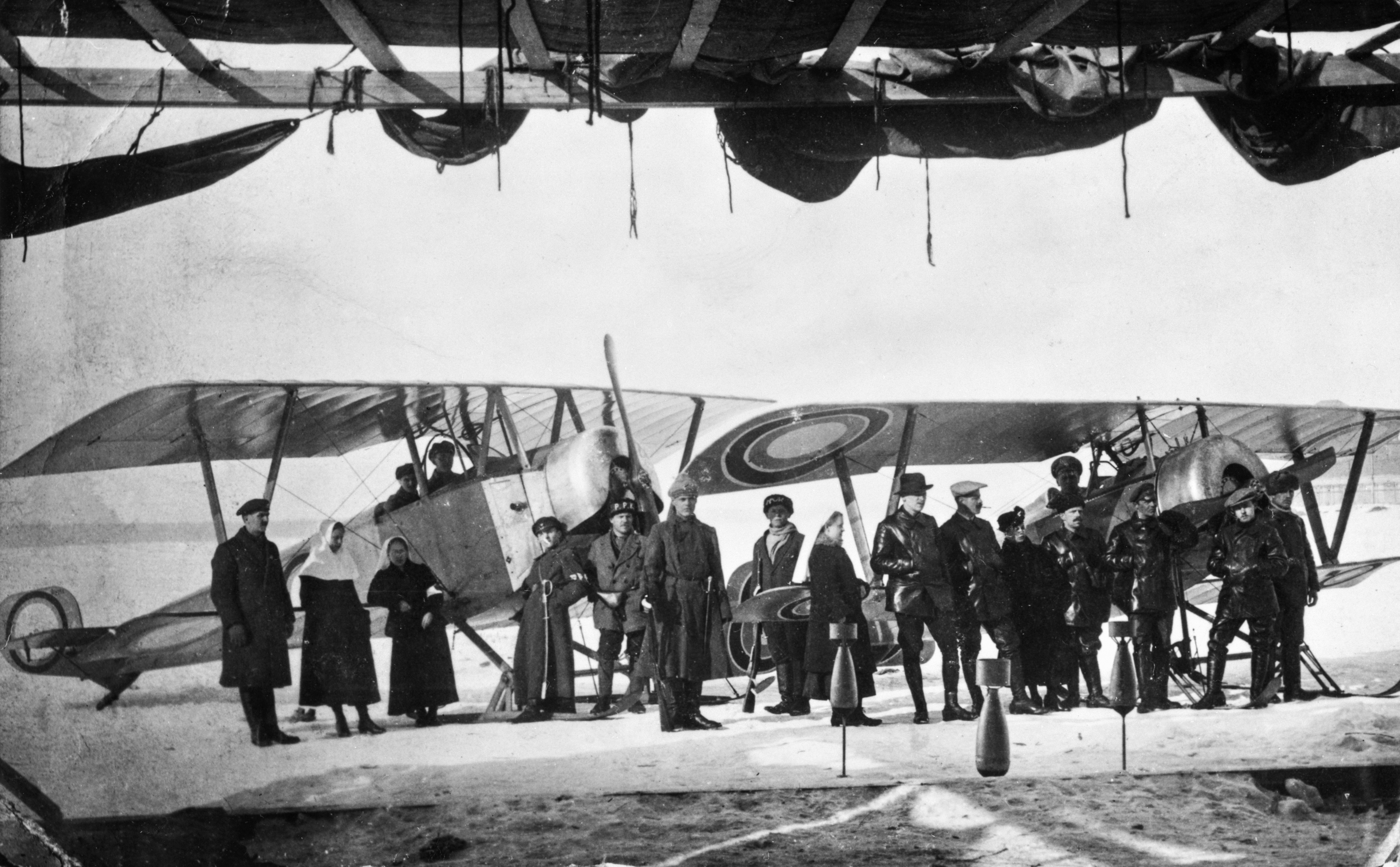 Lentokenttä sijaitsi Naistenlahden jäällä. Seisomassa neljäs vasemmalta on Eino Rahja. (Kuvan koneet ovat Nieuport 10 (vasemmalla) ja Nieuport 21 (oikealla). Oikeanpuolimmaisessa koneessa on DUKS-tehtaalle tyypilliset kansallistunnukset.)